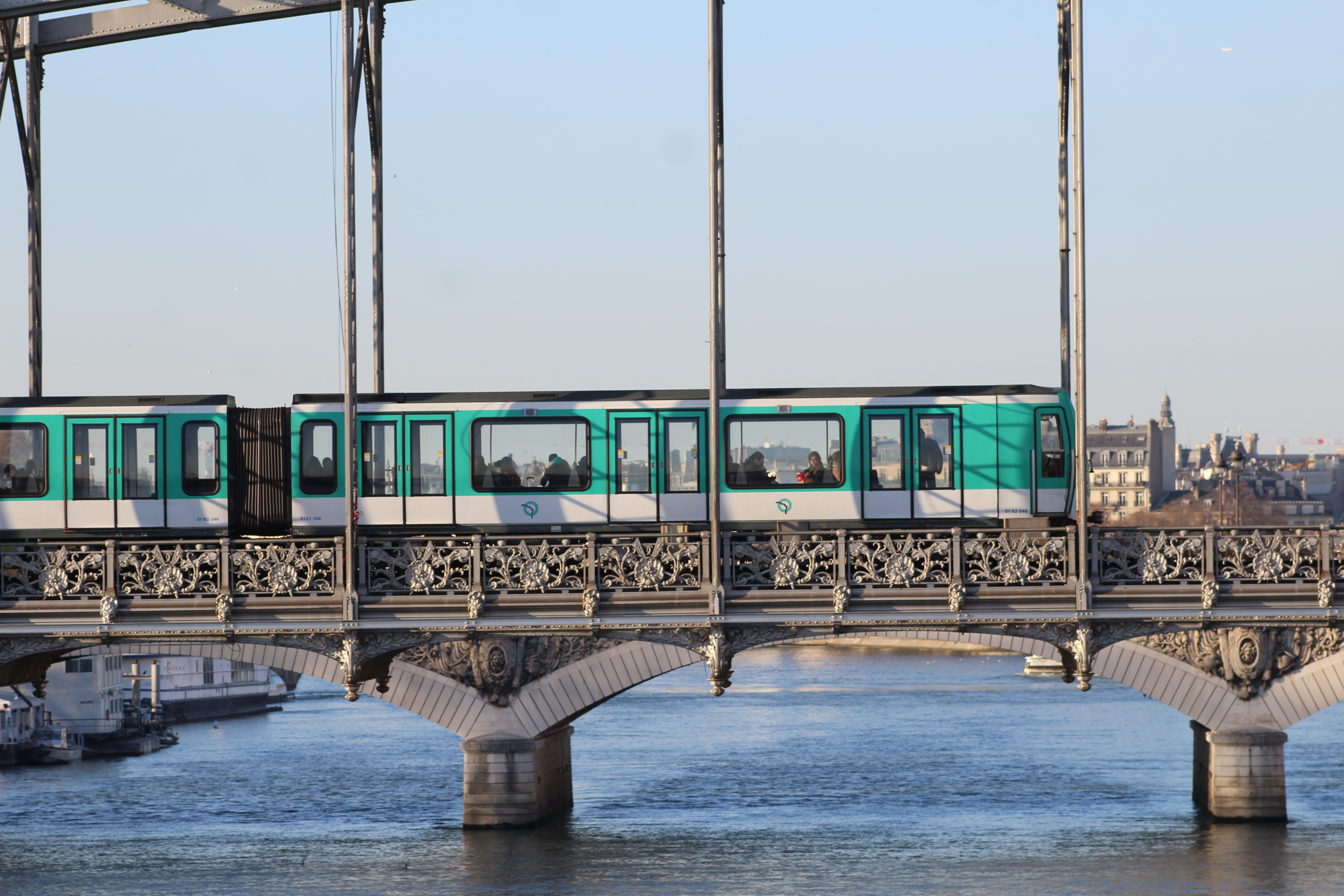 Viaduc d'Austerlitz à Paris.